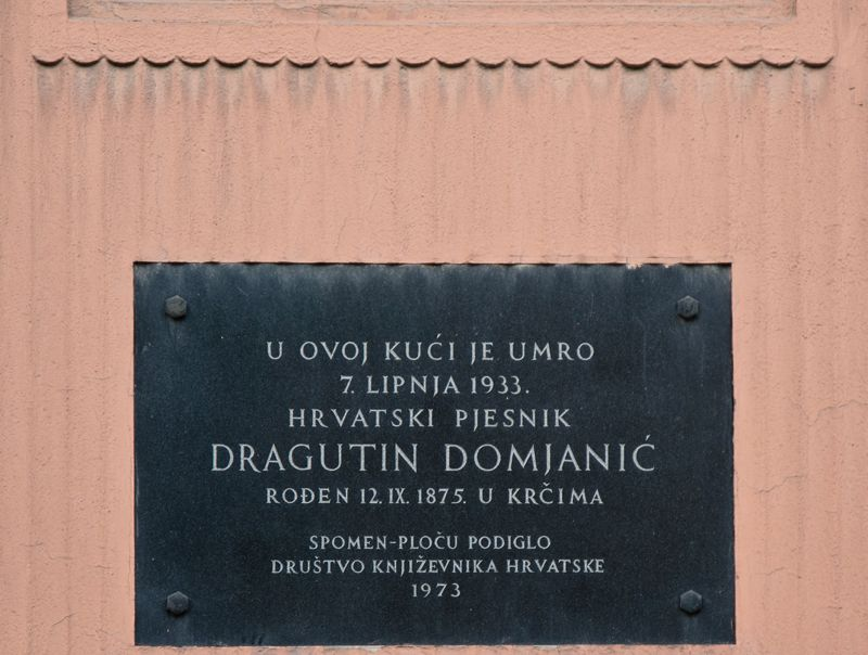 Zagreb